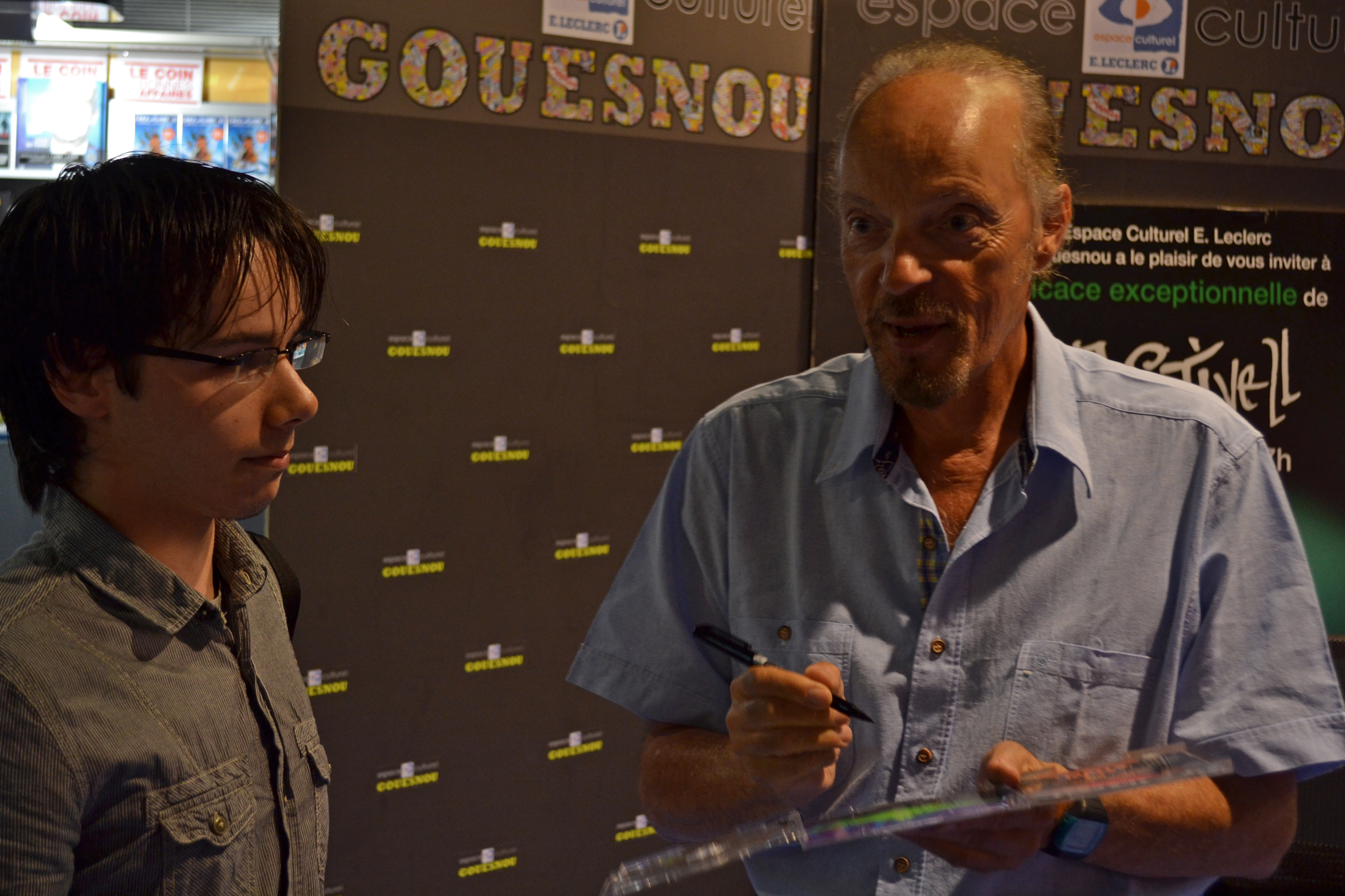 Dédicace exceptionnelle d'Alan Stivell au centre culturel Gouesnou à Brest le 16 août 2013, suite à son concert aux Jeudis du port.